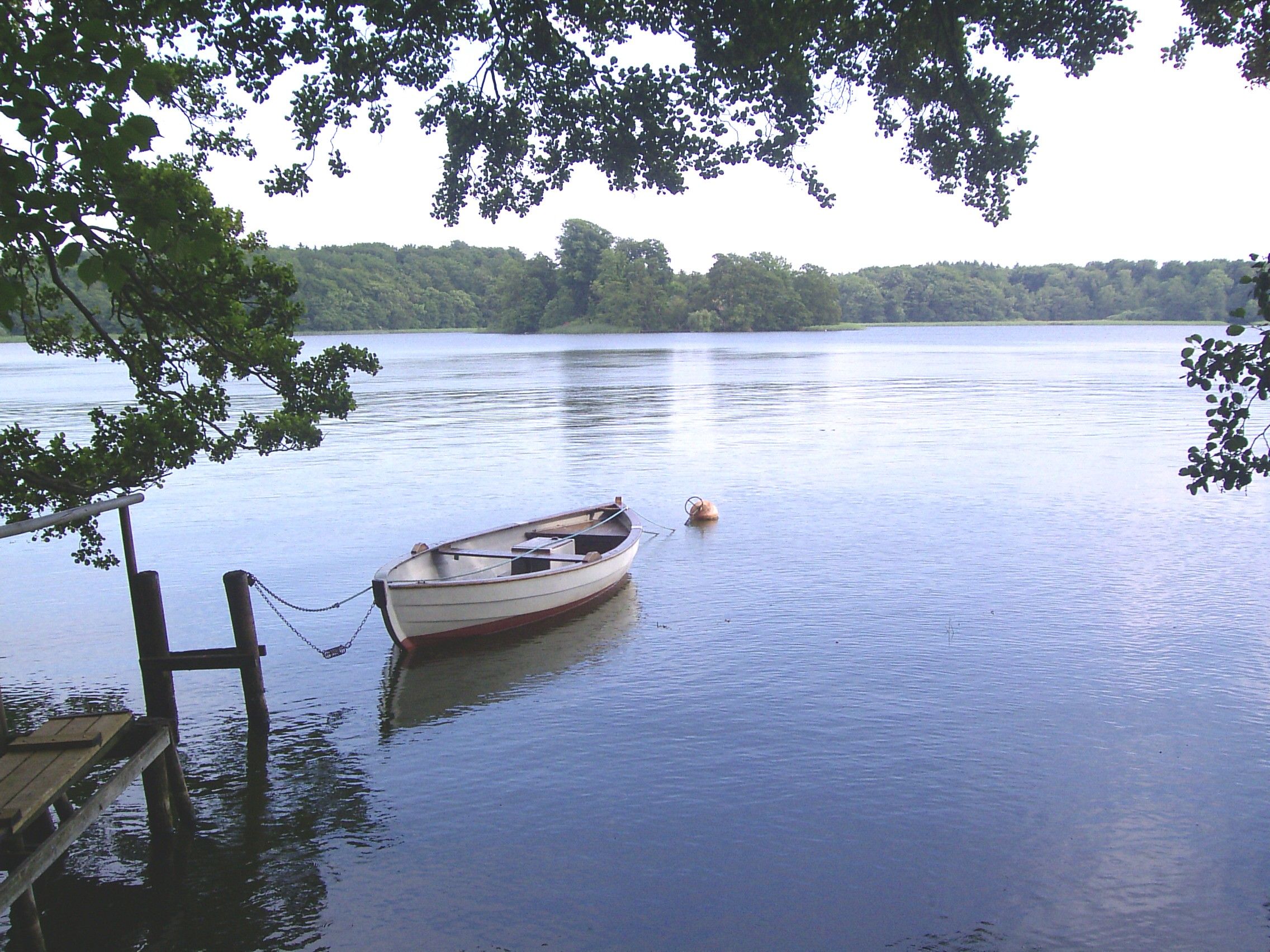 Billede af Farum Sø, med Klavs Nars holm i baggrunden. Taget af Bruger:Sir48, 2005.07.09